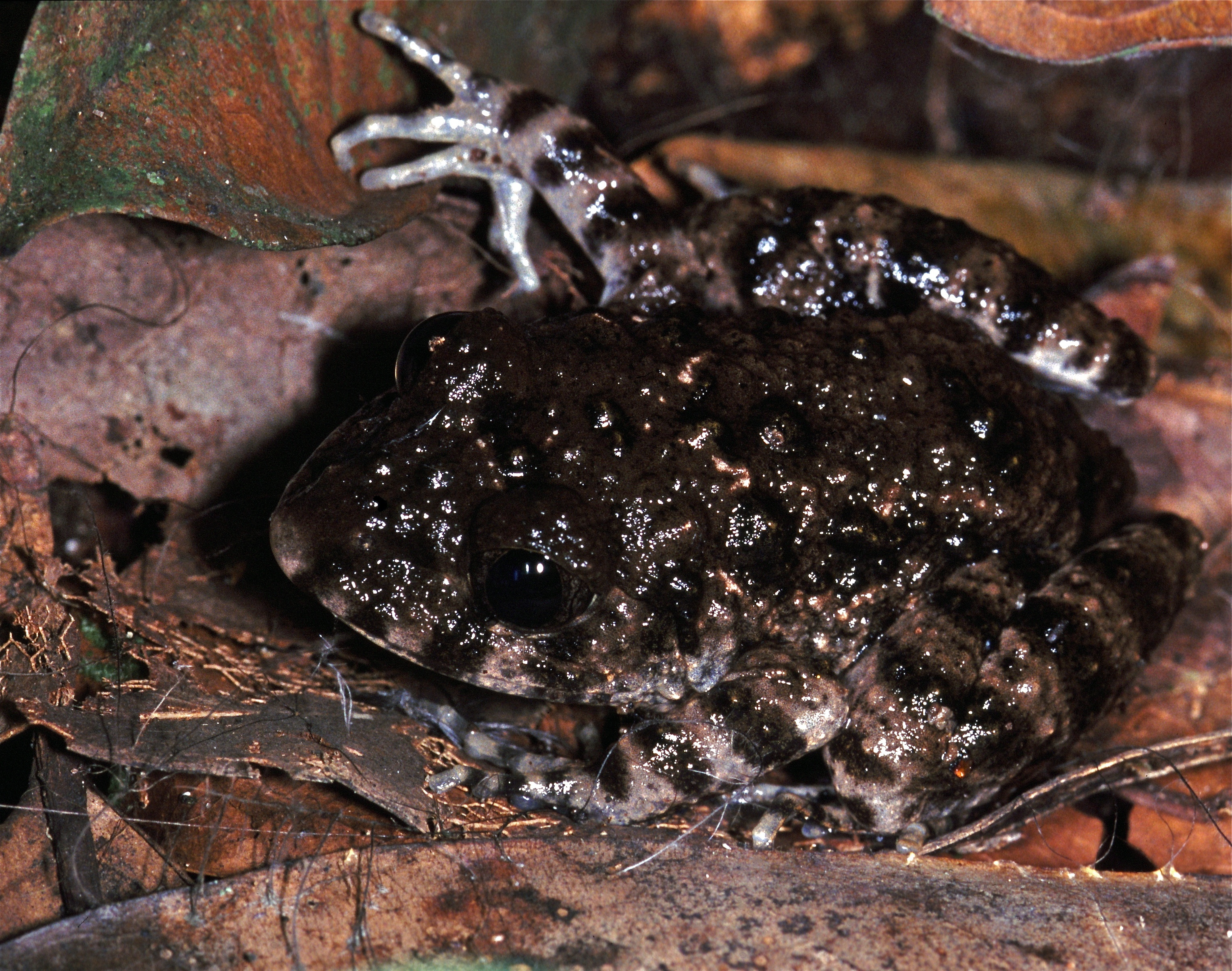 Korup NP, CAMEROON